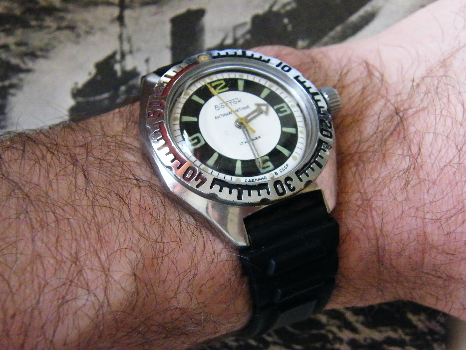 Wostok Amfibia. Mechanizm 17 kamieni.